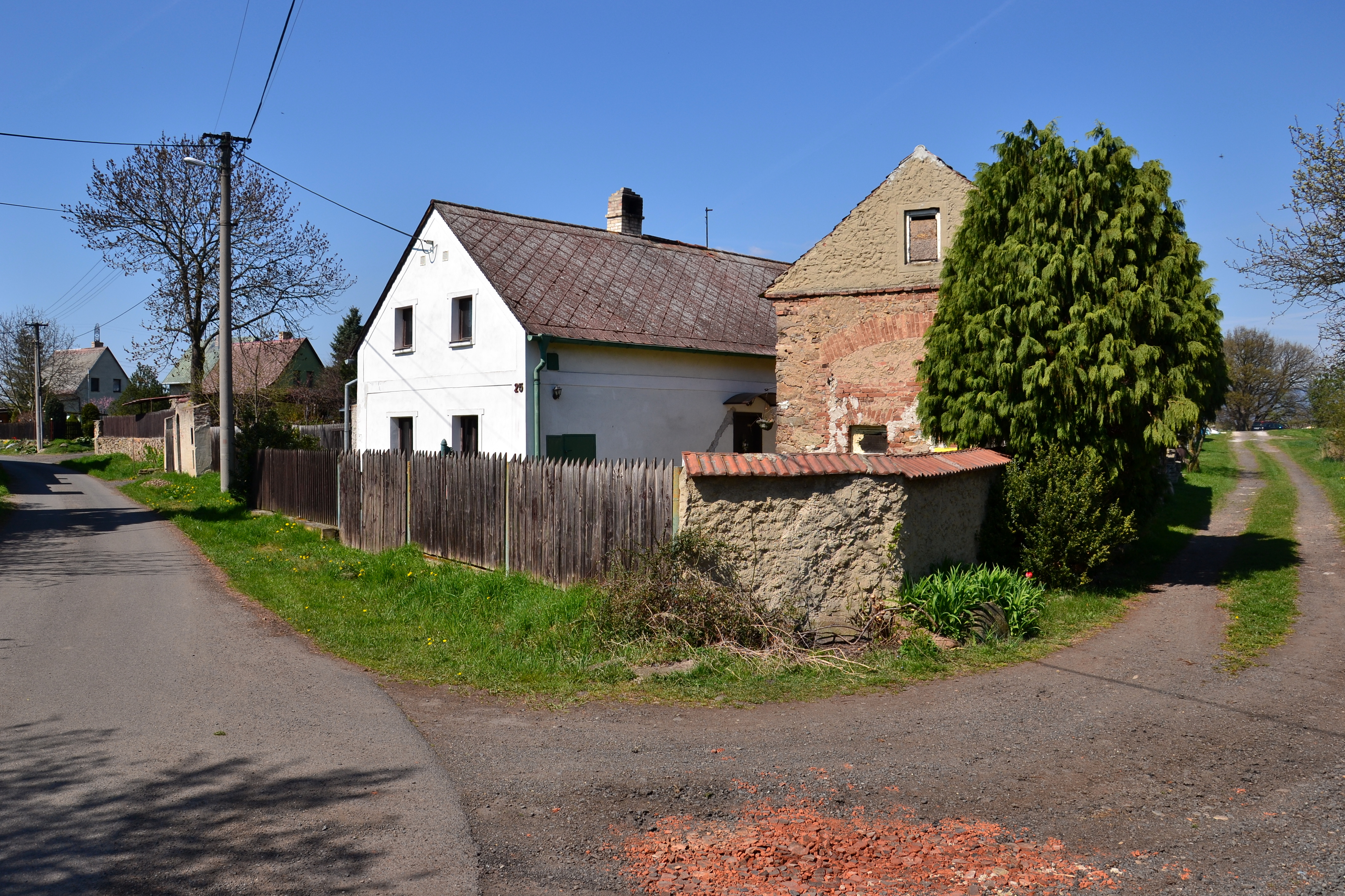 Střed vesnice